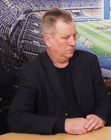 Александр Ищенко - украинский футбольный тренер